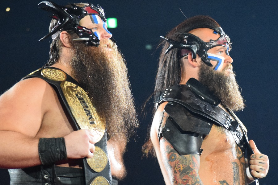 2017年6月11日 大阪城ホール「DOMINION 6.11 in OSAKA-JO HALL」 ウォー・マシン（レイモンド・ロウ & ハンソン）